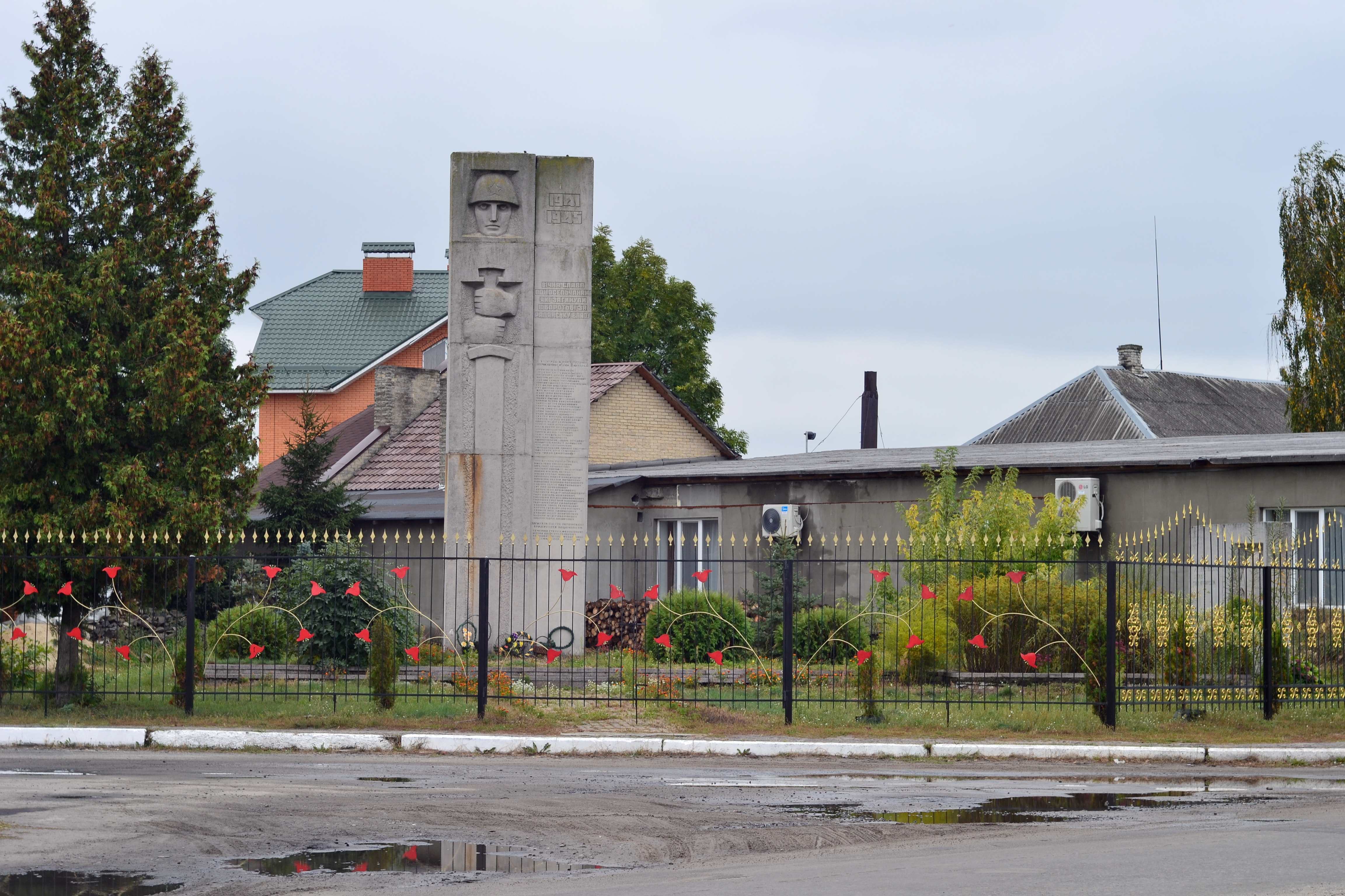 Пам'ятник землякам (1970 рік) - загальний вигляд - Раків Ліс (в центрі села, біля будинку культури) Камінь-Каширський район Волинська область Україна